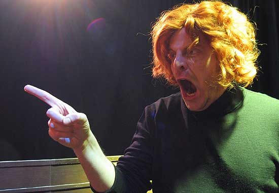 El actor español Raúl Cimas durante la grabación de Muchachada Nui